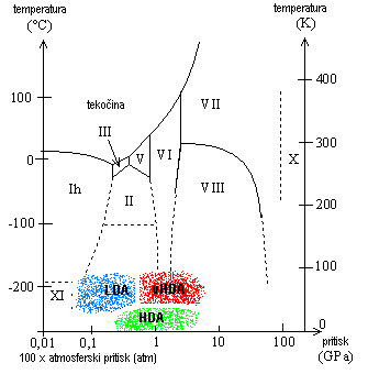 Diagram prikazuje fazni diagram za različne oblike vodnega ledu. Dodano je področje amorfnega ledu.